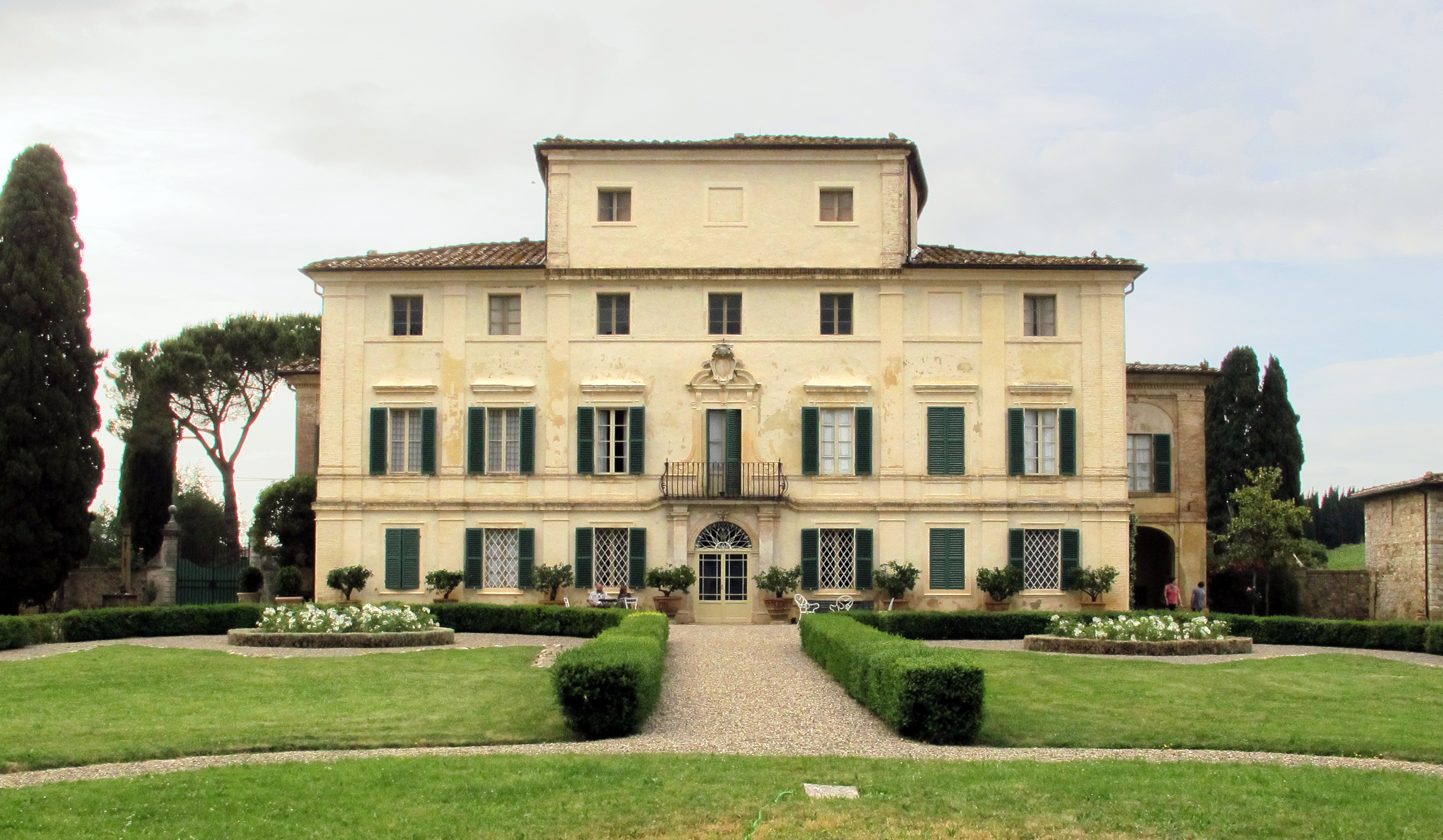 Villa di Geggiano